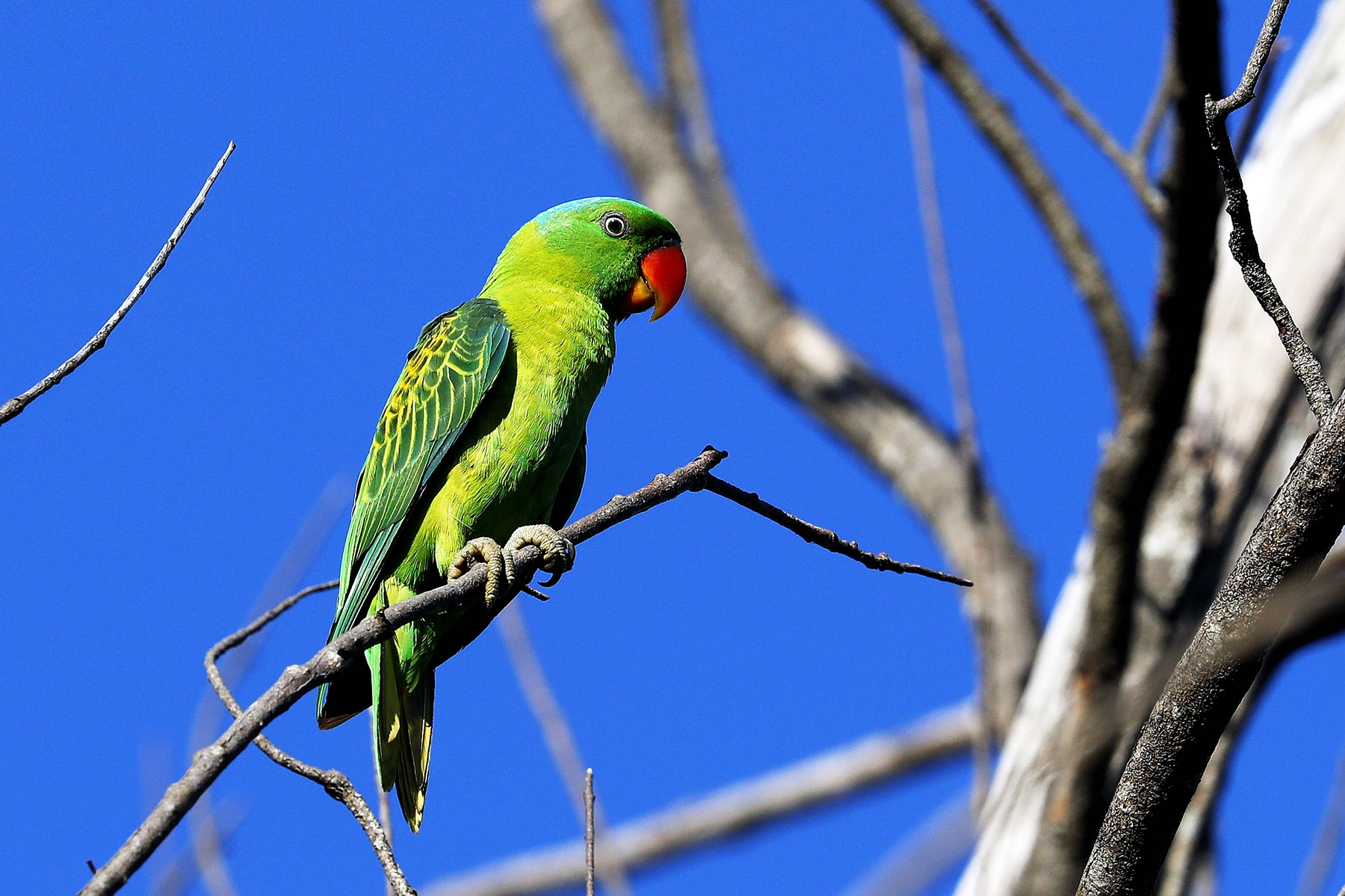 蓝颈鹦鹉 Blue-naped parrot (Tanygnathus lucionensis), Taman Prince Philip Kota Kinabalu Sabah Malaysia